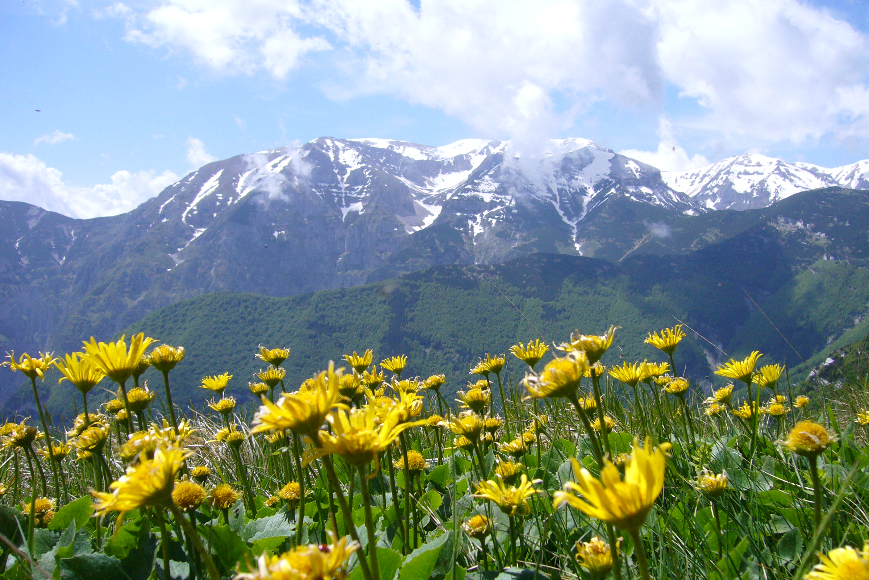 Block Haus